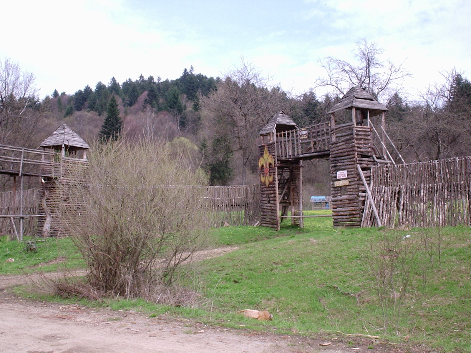 Stebnik (Steinfels), stanica harcerska pamiętająca operację "Bieszczady 40" kwiecień 2005, Autor : Marek Silarski, Bielsko-Biała